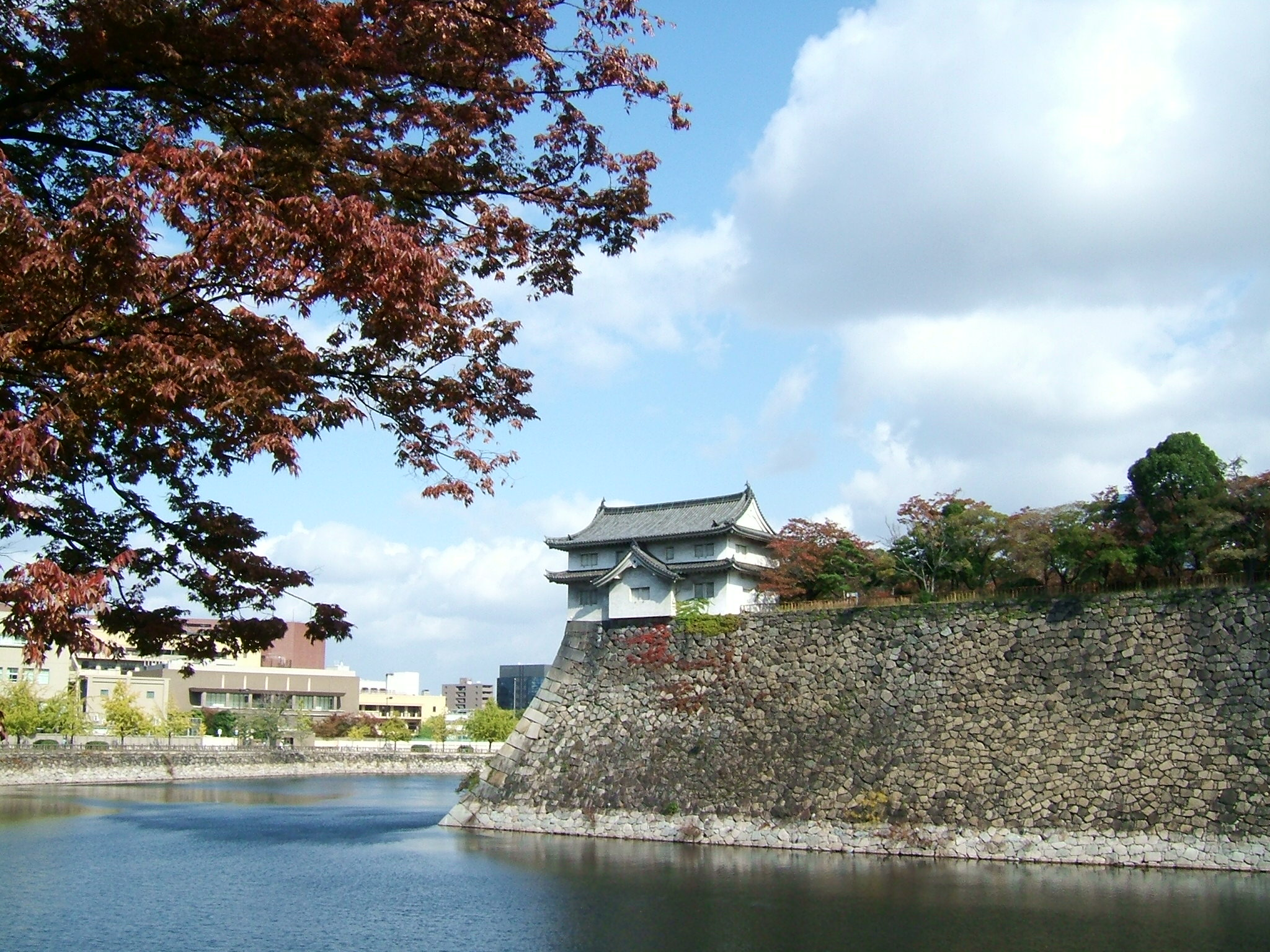 Inui Turret (Inui Yagura) at Nishinomaru Garden, Osaka Castle